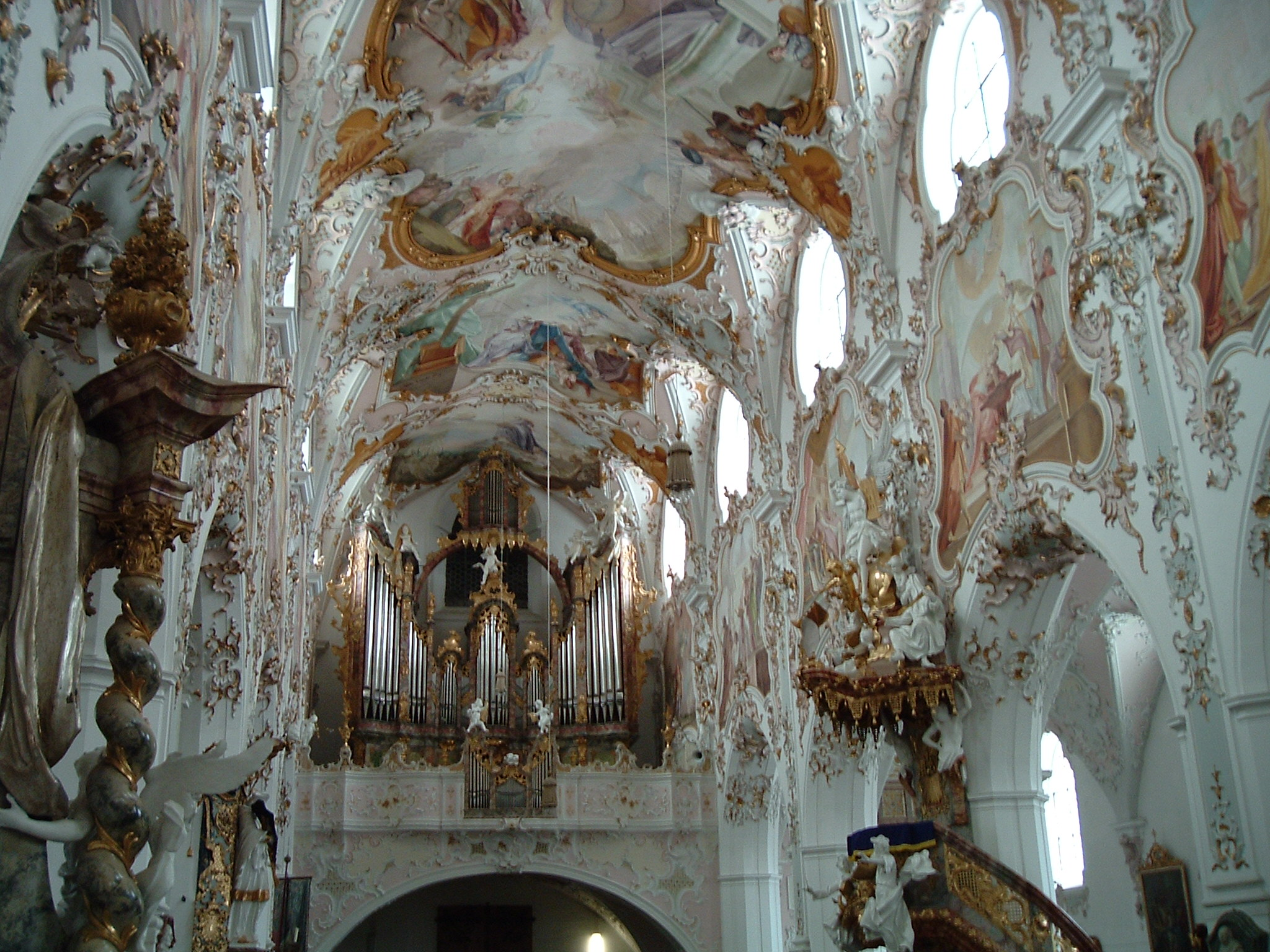 Rottenbuch, ehem. Klosterkirche: Deckenstuck von Franz Xaver Schmuzer, 1741–1745; Fresken von Matthäus Günther; Barockorgel von Balthasar Freiwiß